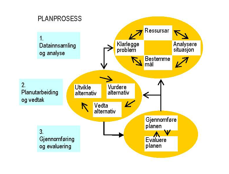 grafisk fremstilling av planleggingsprosessen.